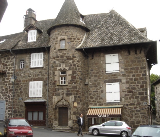 Façade sur rue de l'Hôtel dit des Princes de Monaco, à Vic-sur-Cère (15)